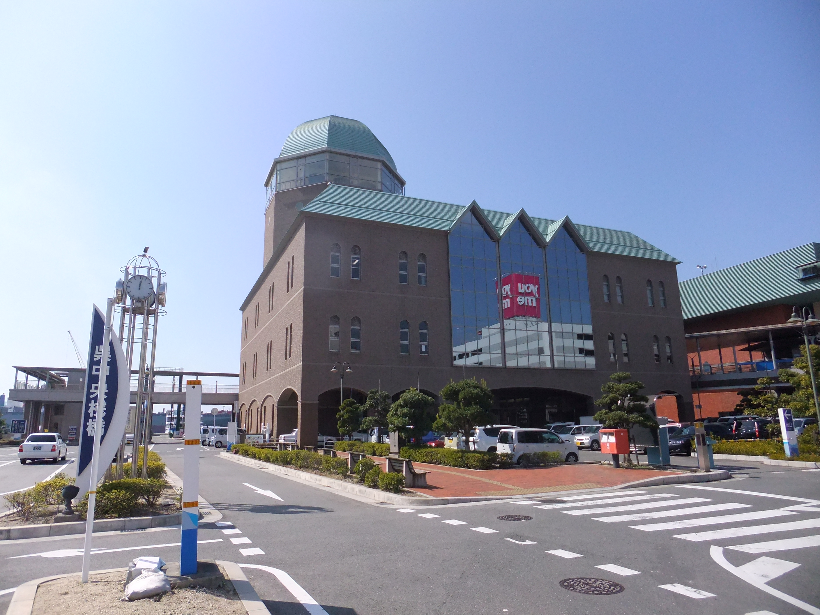 呉中央桟橋